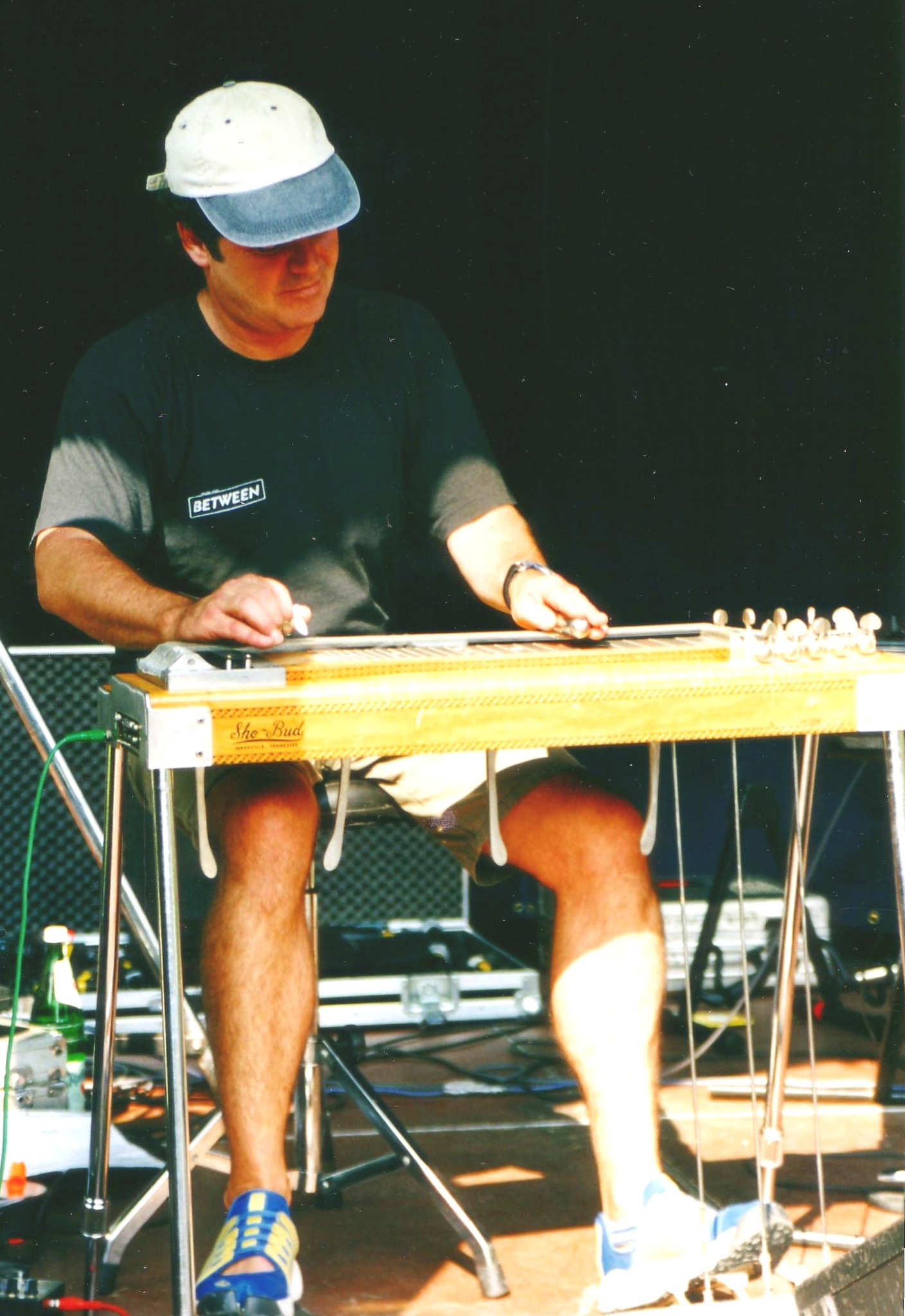 Jo Steinebach bei einem Konzert in Essen, 2000